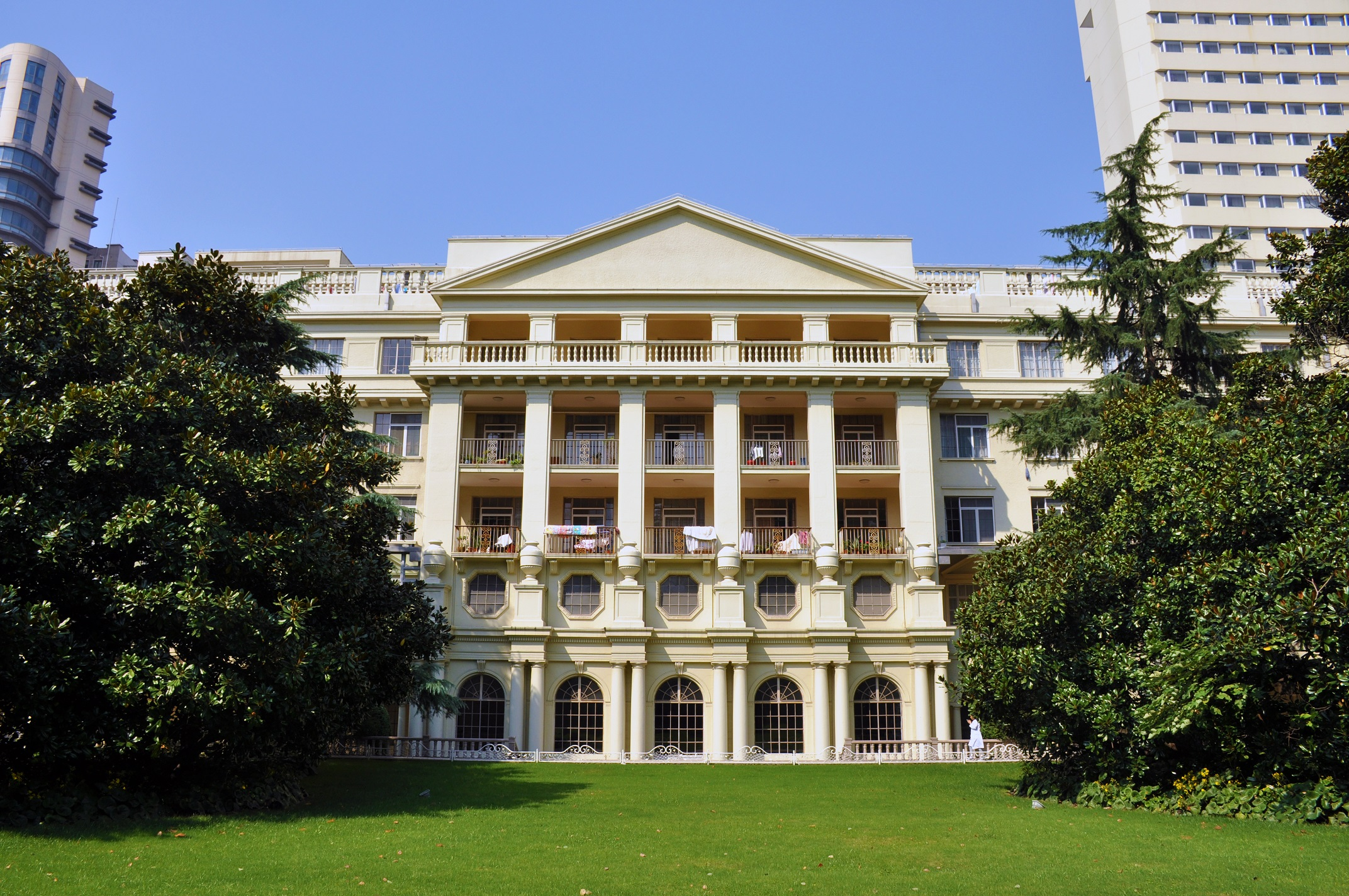 宏恩医院 延安西路221号 1926年